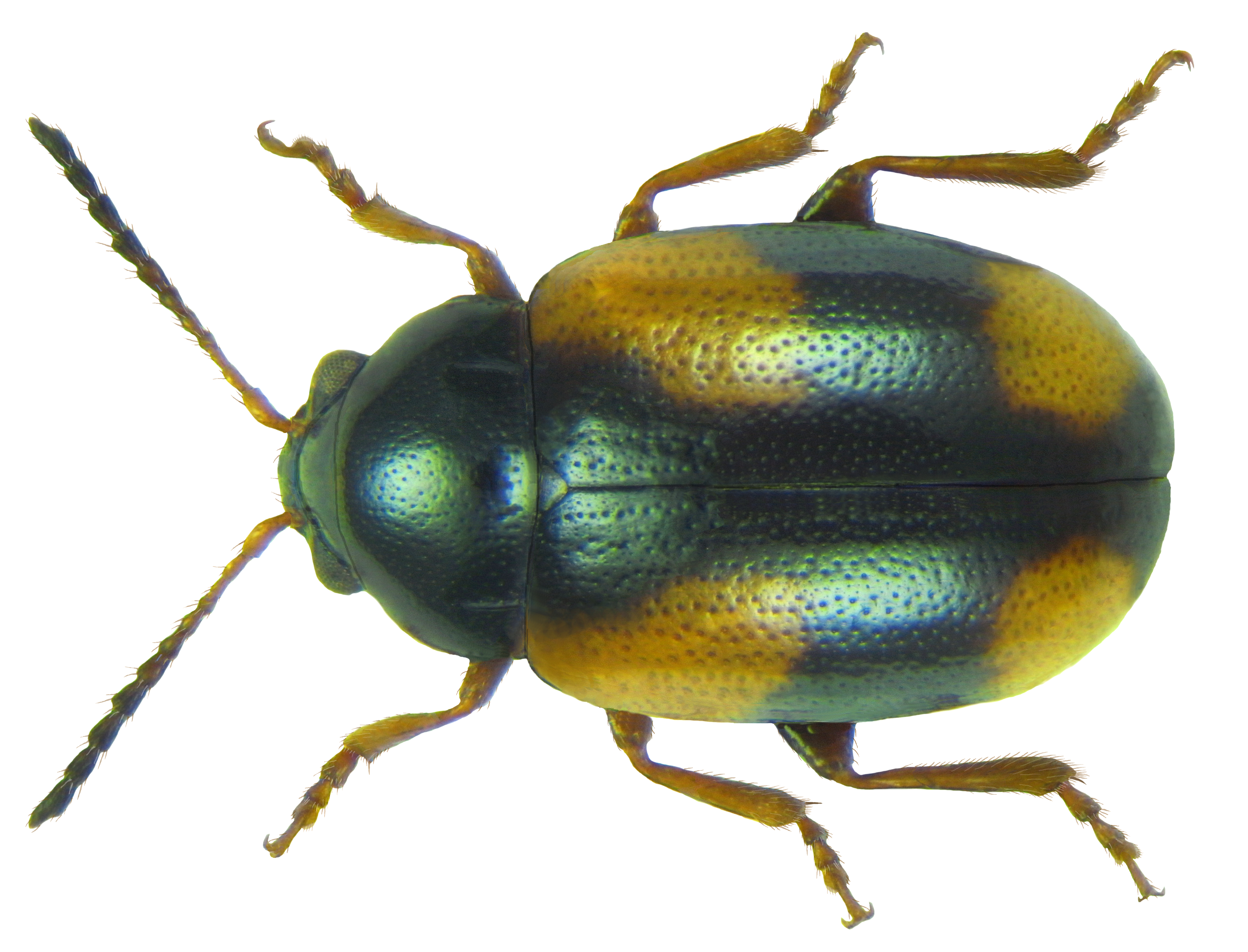 Family: Chrysomelidae Size: 3.2 mm Location: Namibia, Otjiwarongo, Waterberg, 1700 m U.Schmidt leg, 16.III.1994; det. Mauser, 2011 Photo: U.Schmidt, 2012